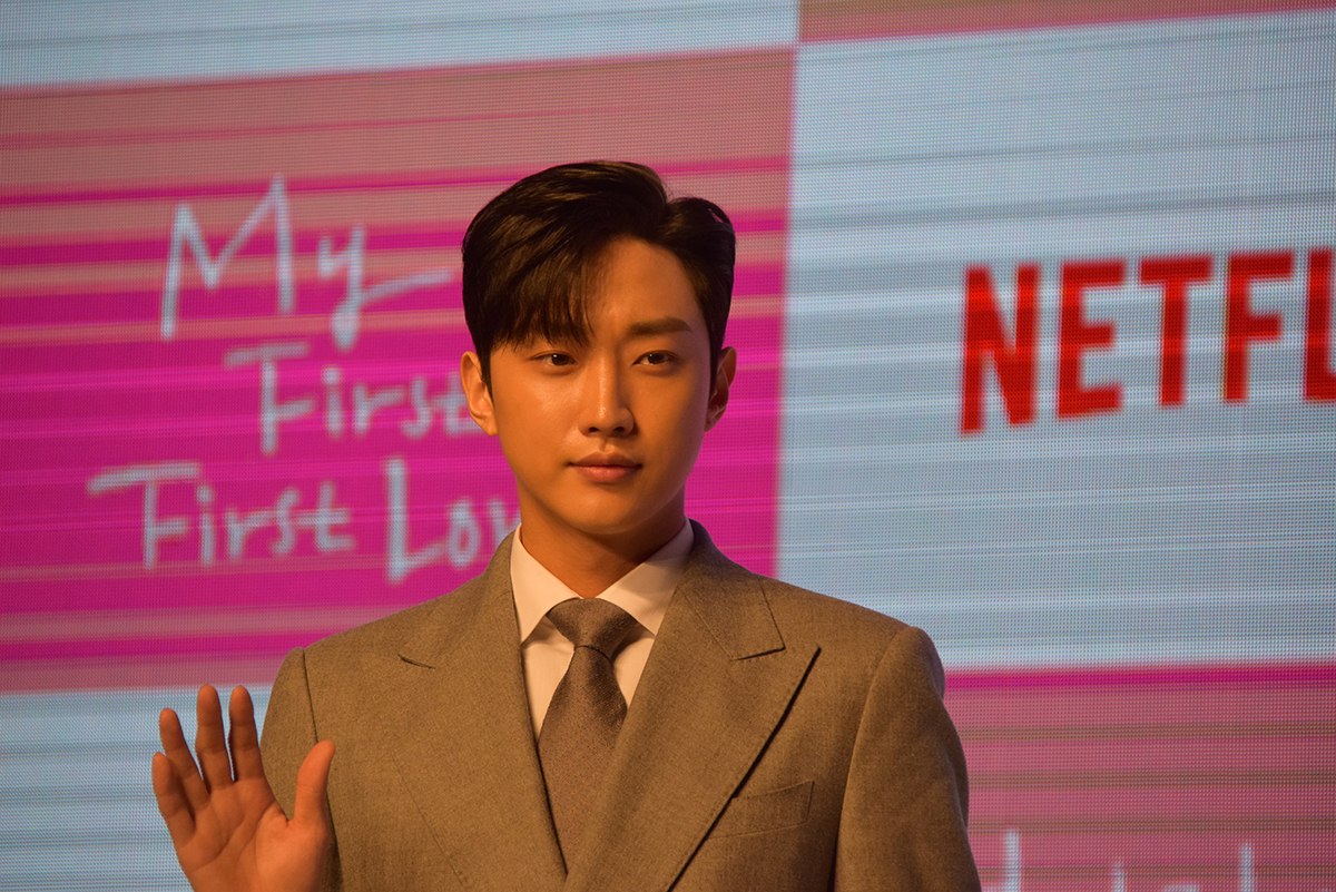 진영 넷플릭스오리지널 '첫사랑은 처음이라서' (My First First Love) 제작발표회 (2019.4.12)